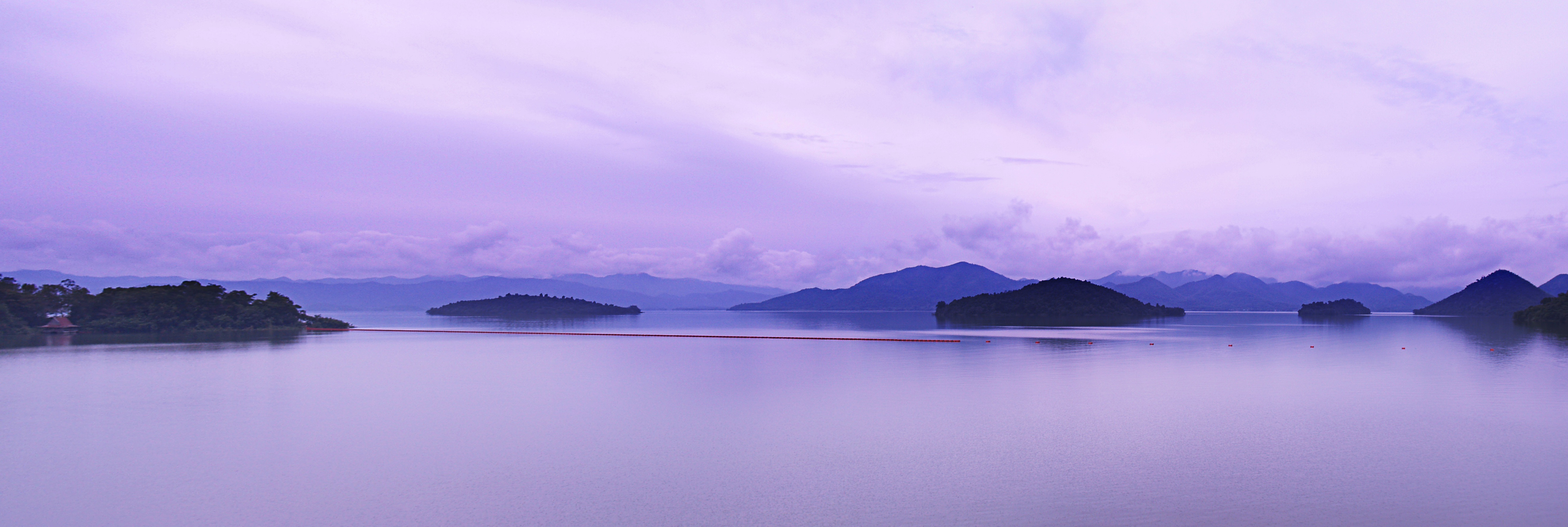 อุทยานแห่งชาติแก่งกระจาน อ่างเก็บน้ำข้างที่ทำการอุทยาน ผู้ส่ง ปฏิพัทธ์ บุญวรรณโณ